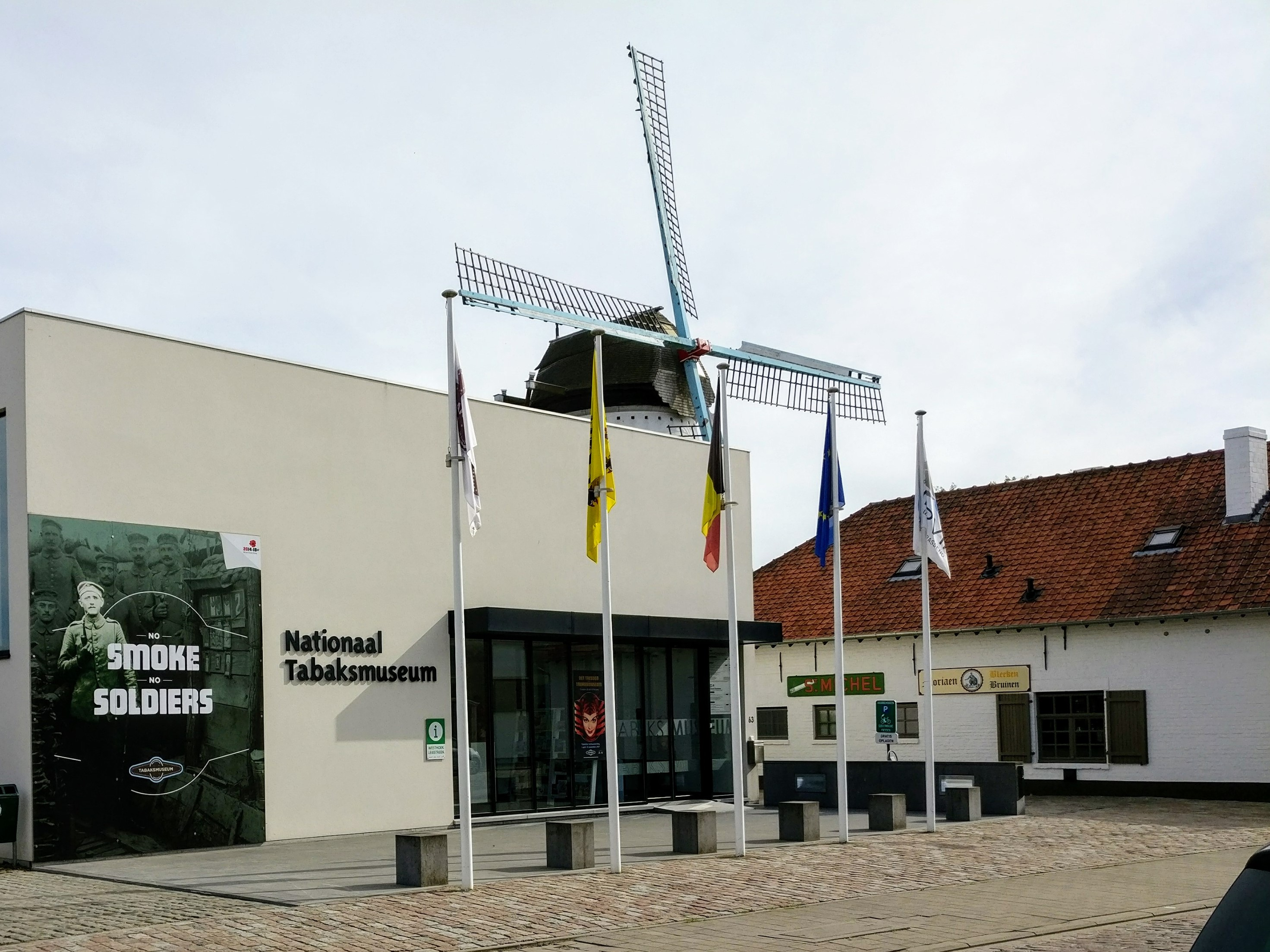 De voorgevel van Het Nationaal Tabaksmuseum in Wervik. Ernaast staat de 'retroherberg' De Moriaen. In de achtergrond ziet u de Briekenmolen.